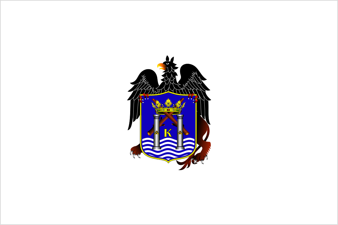 Distrito de Trujillo - Provincia de Trujillo - Región La Libertad